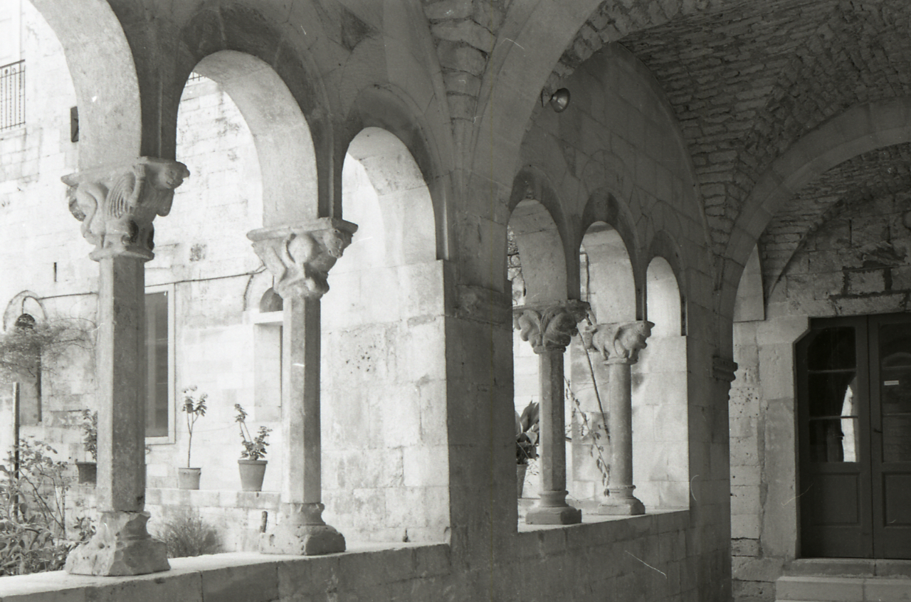 Servizio fotografico : Conversano, 1970 / Paolo Monti. - Strisce: 7, Fotogrammi complessivi: 37 : Negativo b/n, gelatina bromuro d'argento/ pellicola ; 35 mm. - ((I fotogrammi hanno una doppia numerazione. . - Sul portanegativi: Nikmat FP4. - All'interno del portanegativi Monti specifica: "Chiostro di San Benedetto. Esterni.". - Occasione: Documentazione Puglia: scultura e castelli. - Fonte: Agenda di Paolo Monti: Monti - Agenda 1970 (1970), presso Archivio Paolo Monti